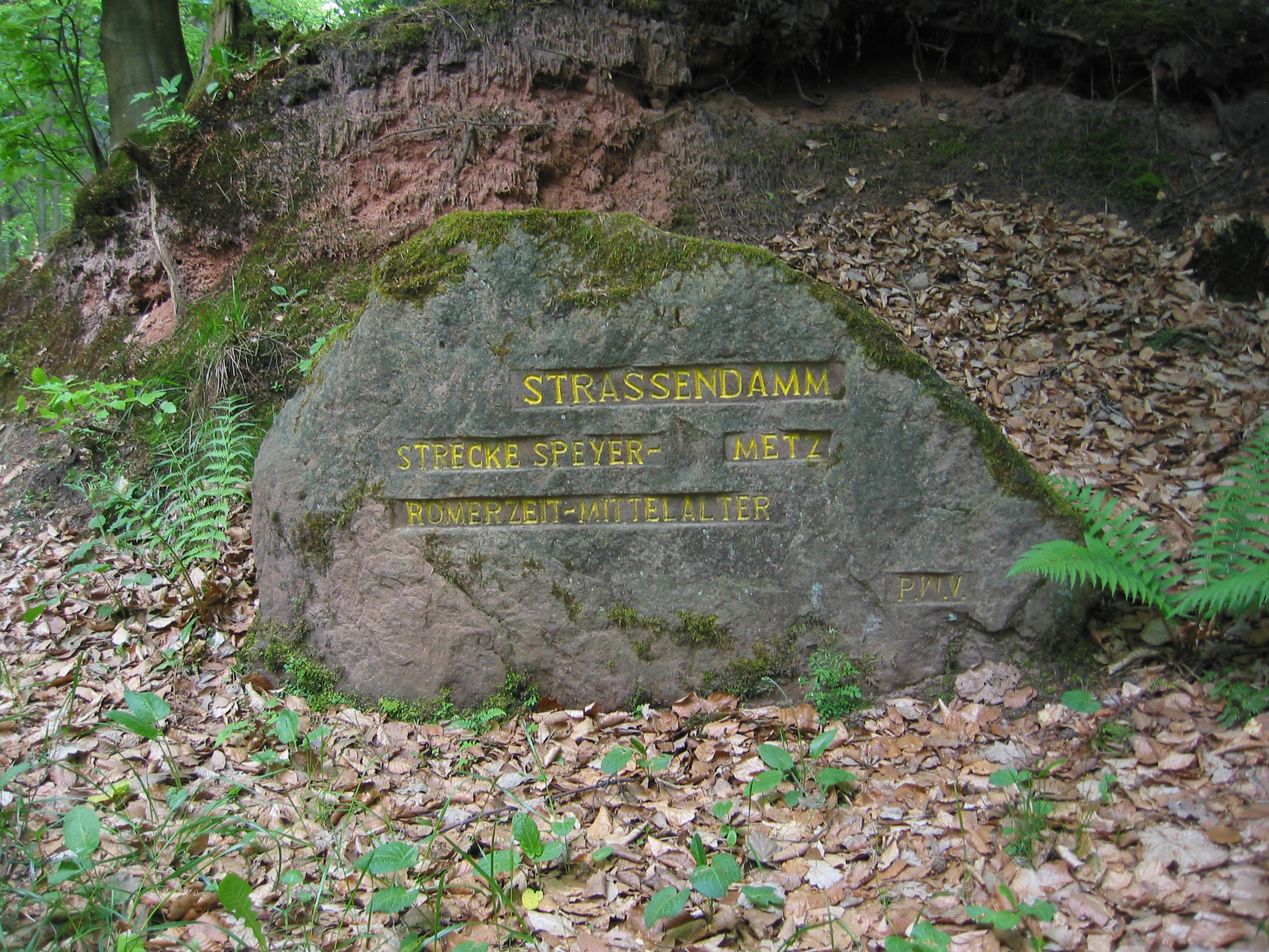 Ritterstein Nummer 246, Strassendamm, Pfälzerwald, Totenkopf.